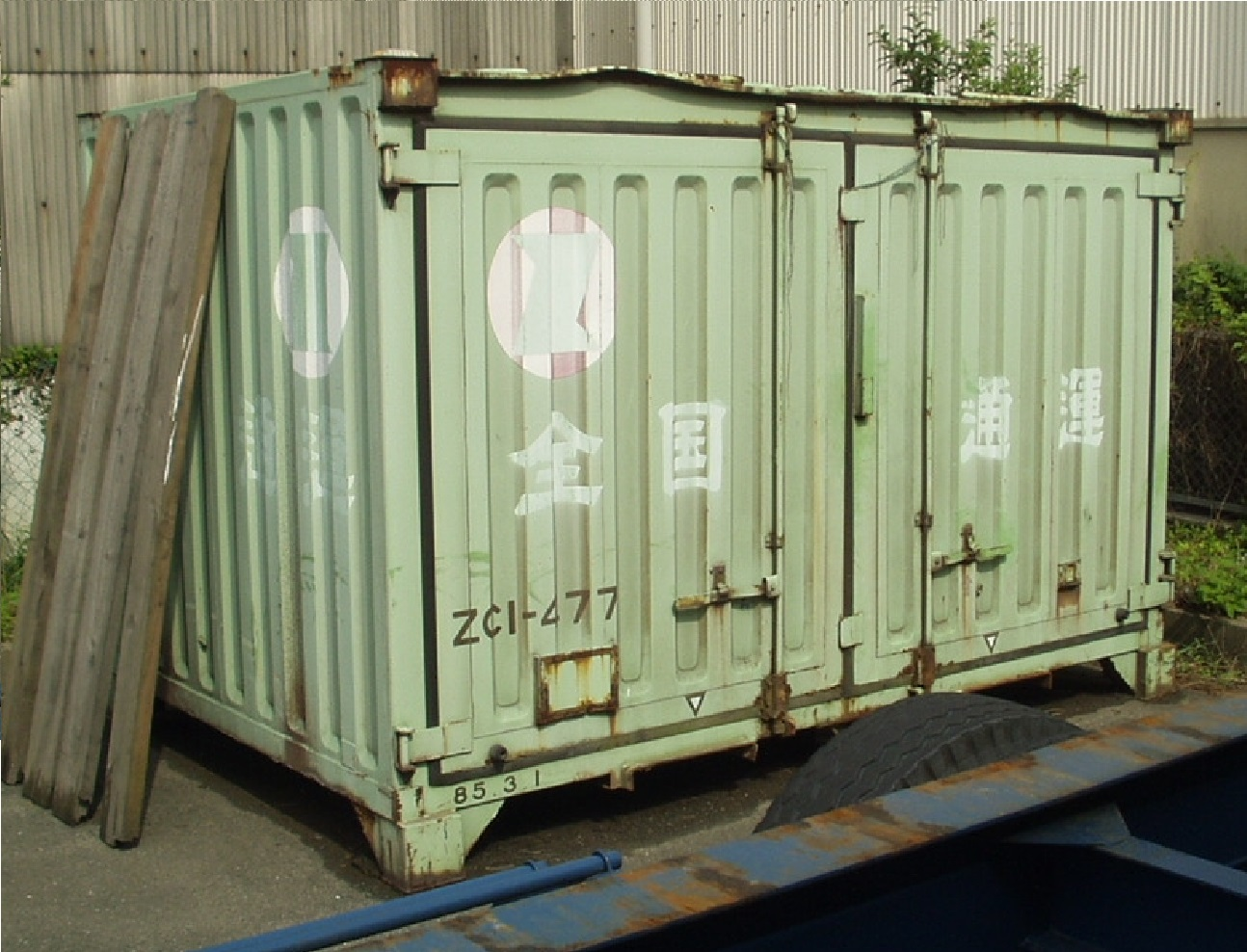 撮影地＝【福岡／太刀浦埠頭】